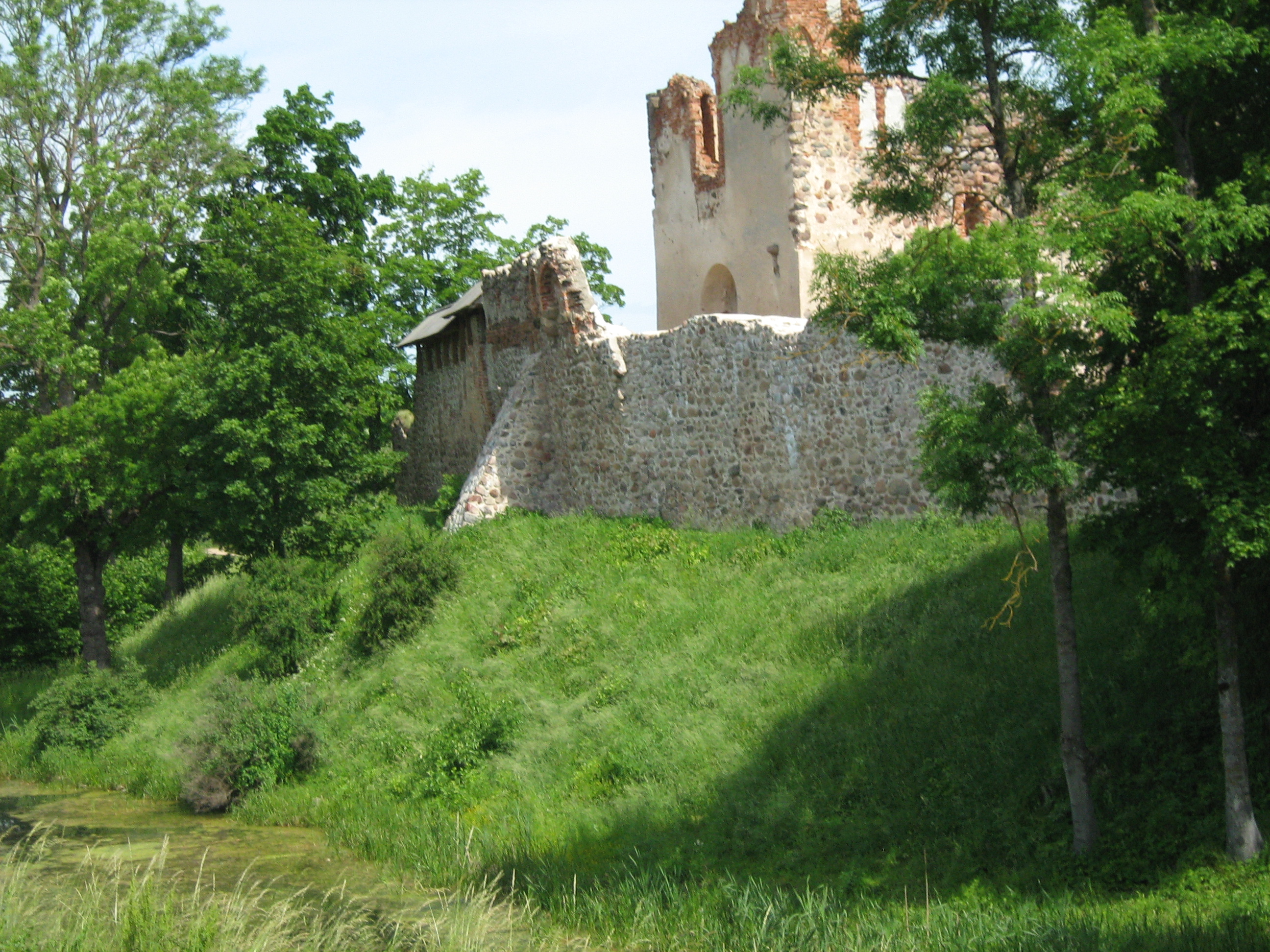 Duobelės pilis